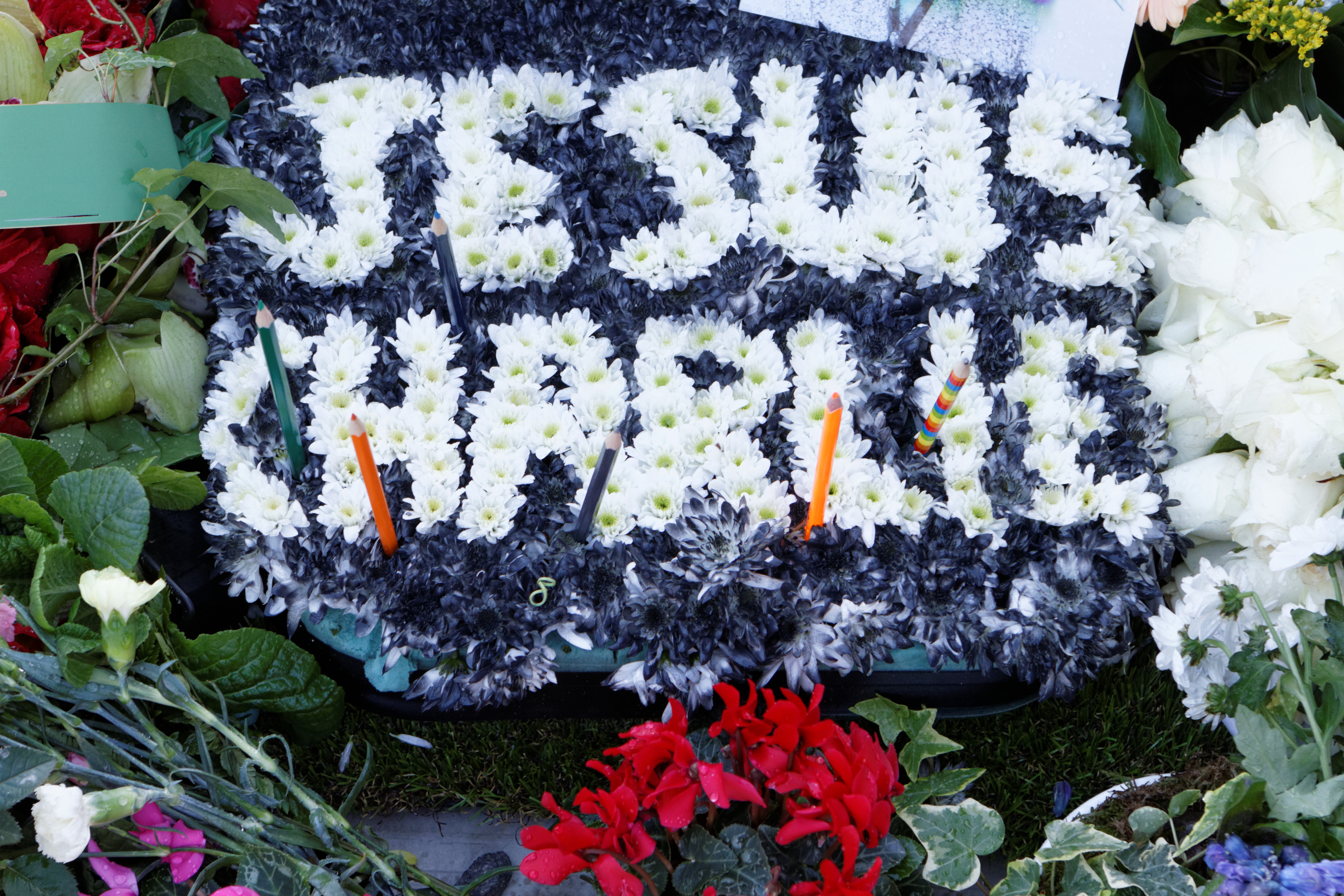 Sépulture de Tignous (1957-2015), caricaturiste et dessinateur de presse mort assassiné dans l'attaque islamiste contre le journal Charlie-Hebdo.